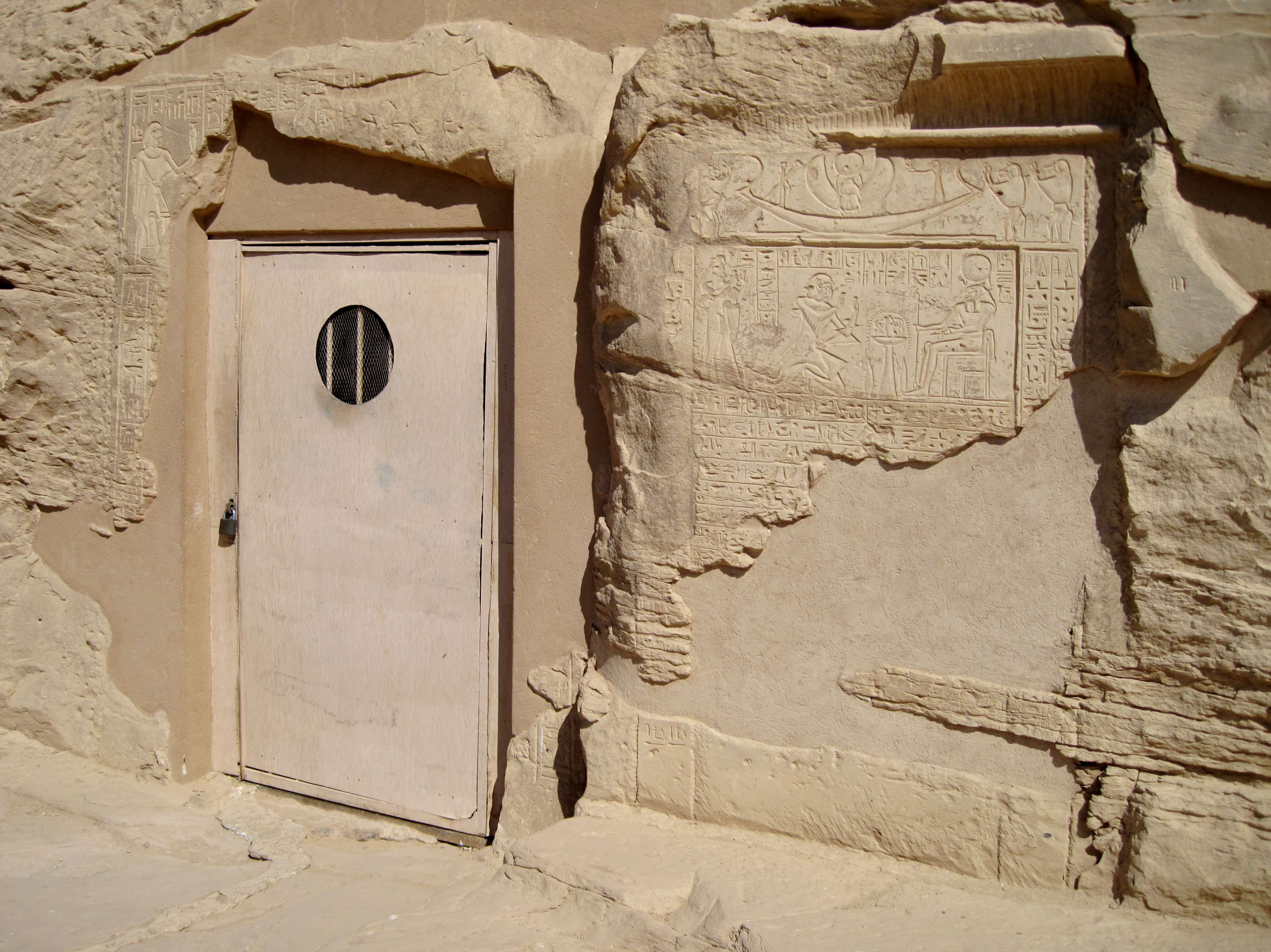 Eingang zum Felsengrab des Setau unter den Felsengräbern des altägyptischen Necheb bei el-Kab, Ägypten